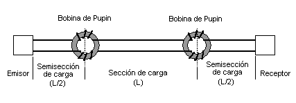 Esquema de un circuito telefónico con bobinas de Pupin. Esta imagen está tomada de es::de:Bild:Pupinleitung.png. Ha sido modificada para traducirla al castellano por PACO Categoría:Electrónica (imagen)